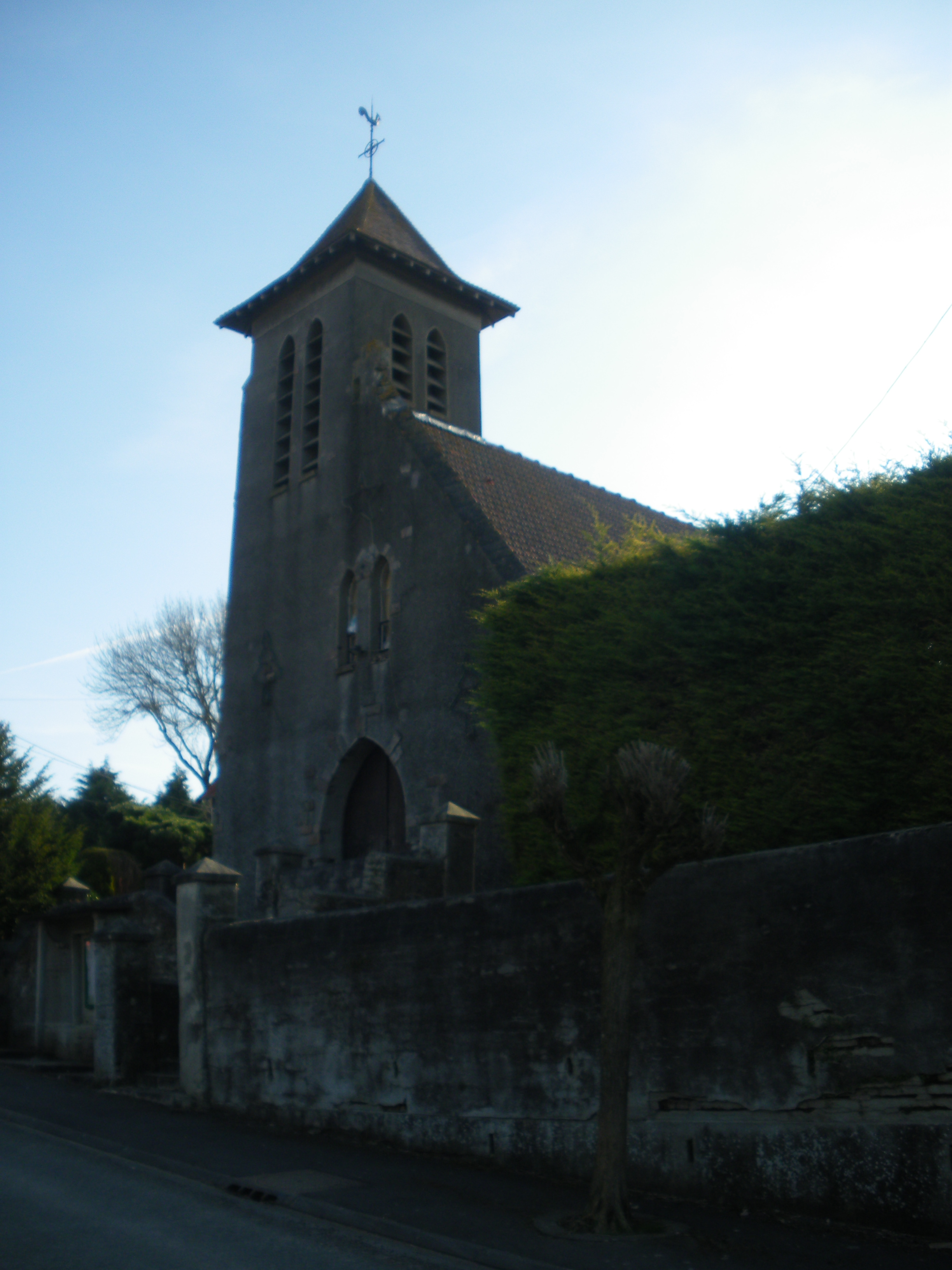 Vue de l'église Saint-Pierre de Warlencourt-Eaucourt.